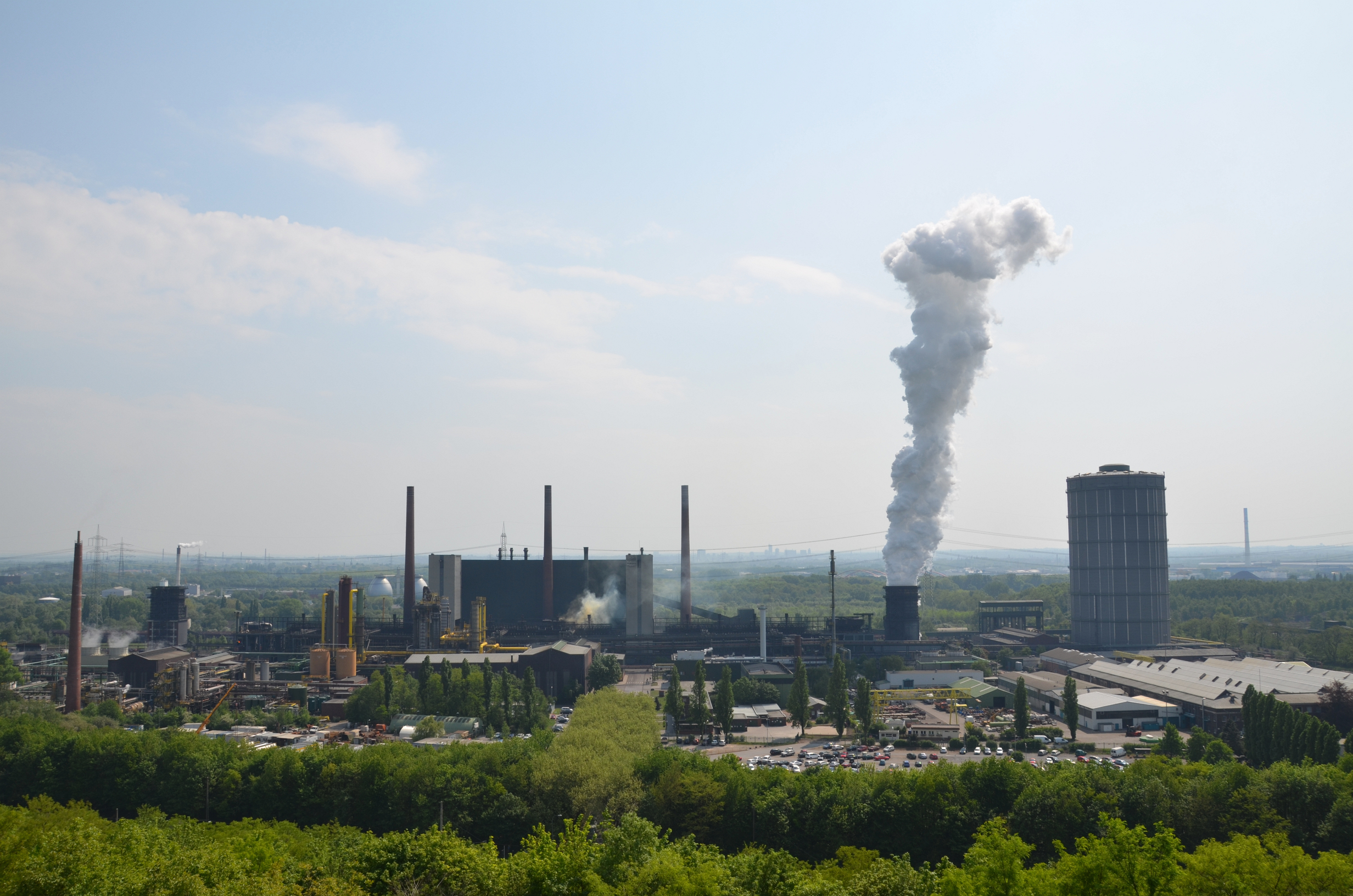 Kokerei Prosper, Bottrop Blick von der Halde Prosperstraße auf die Kokerei, rechts der aktive Löschturm